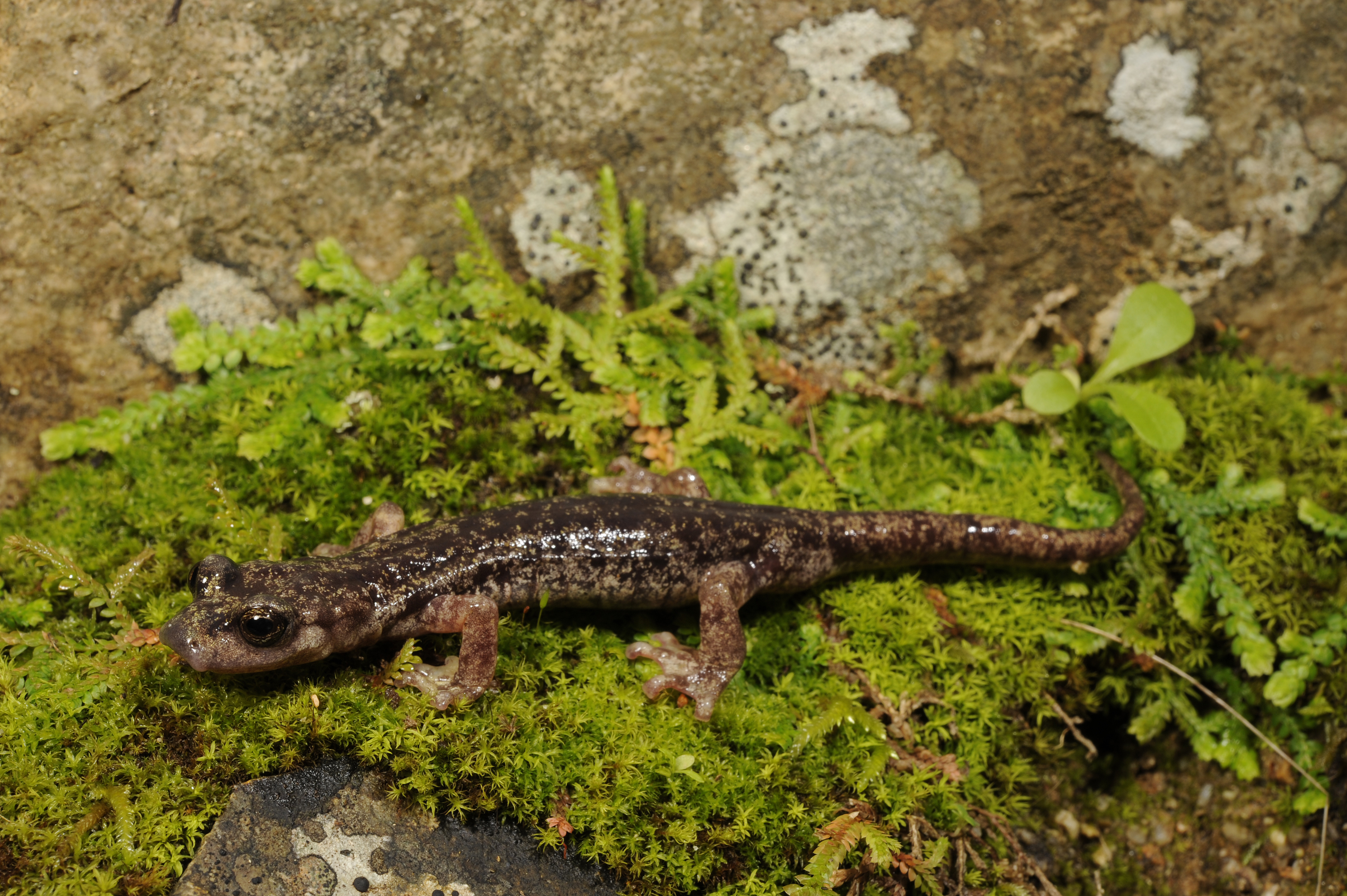 Sopramonte-Höhlensalamander (Speleomantes supramontis) von Sardinien